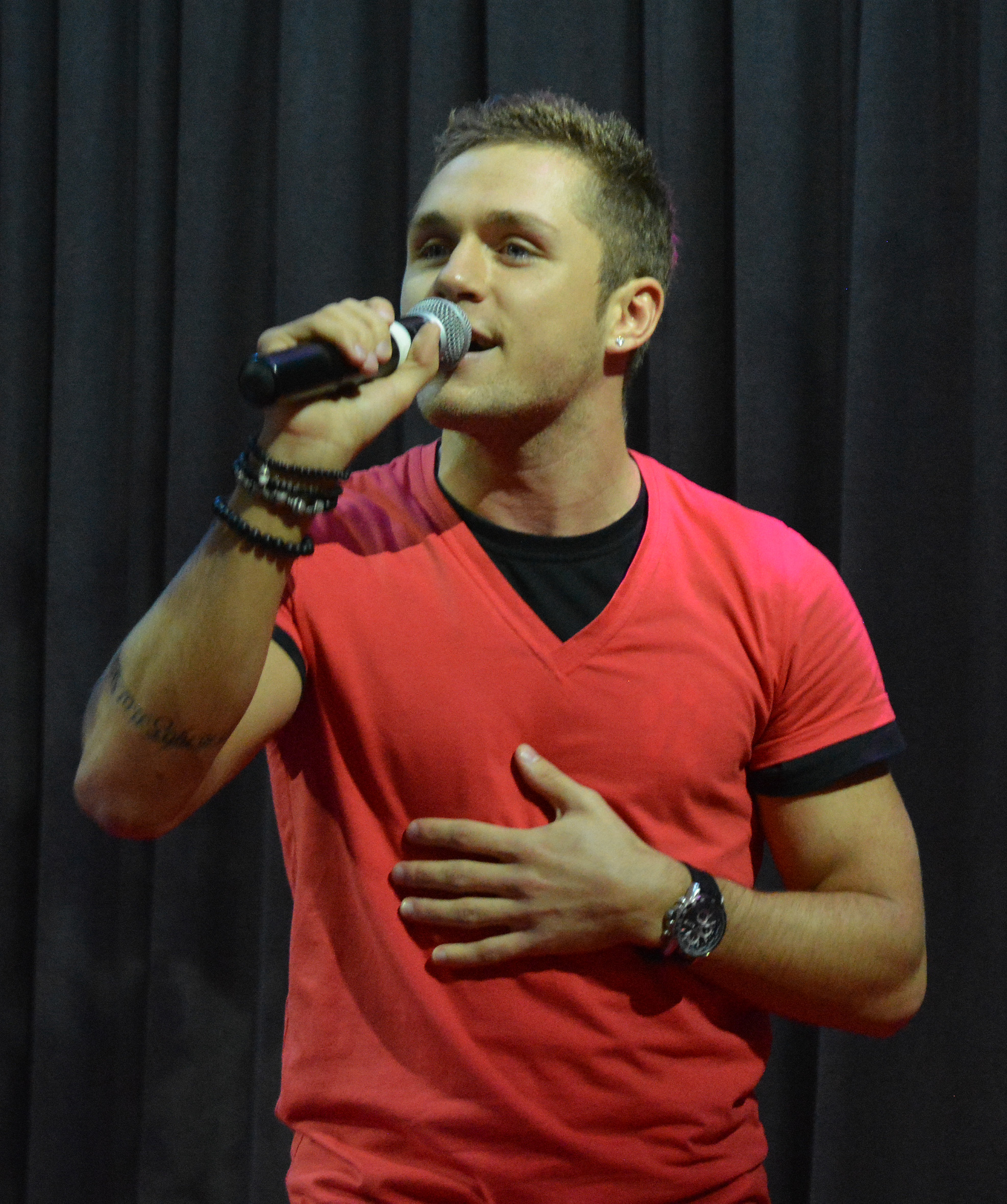 Влад Соколовский на вечеринке New Wave Junior Party (клуб Maxim Bar)